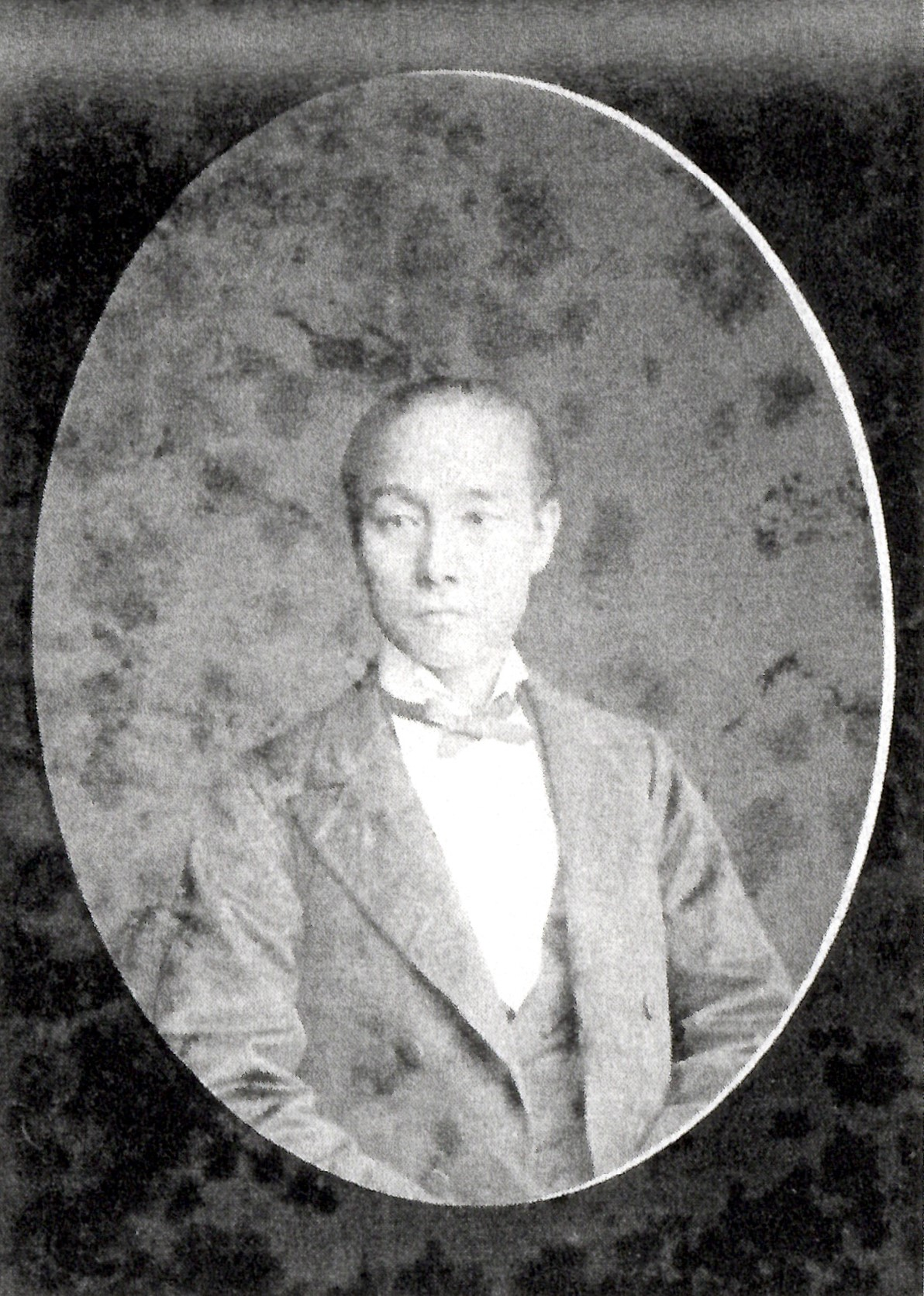 松平親貴の肖像写真。